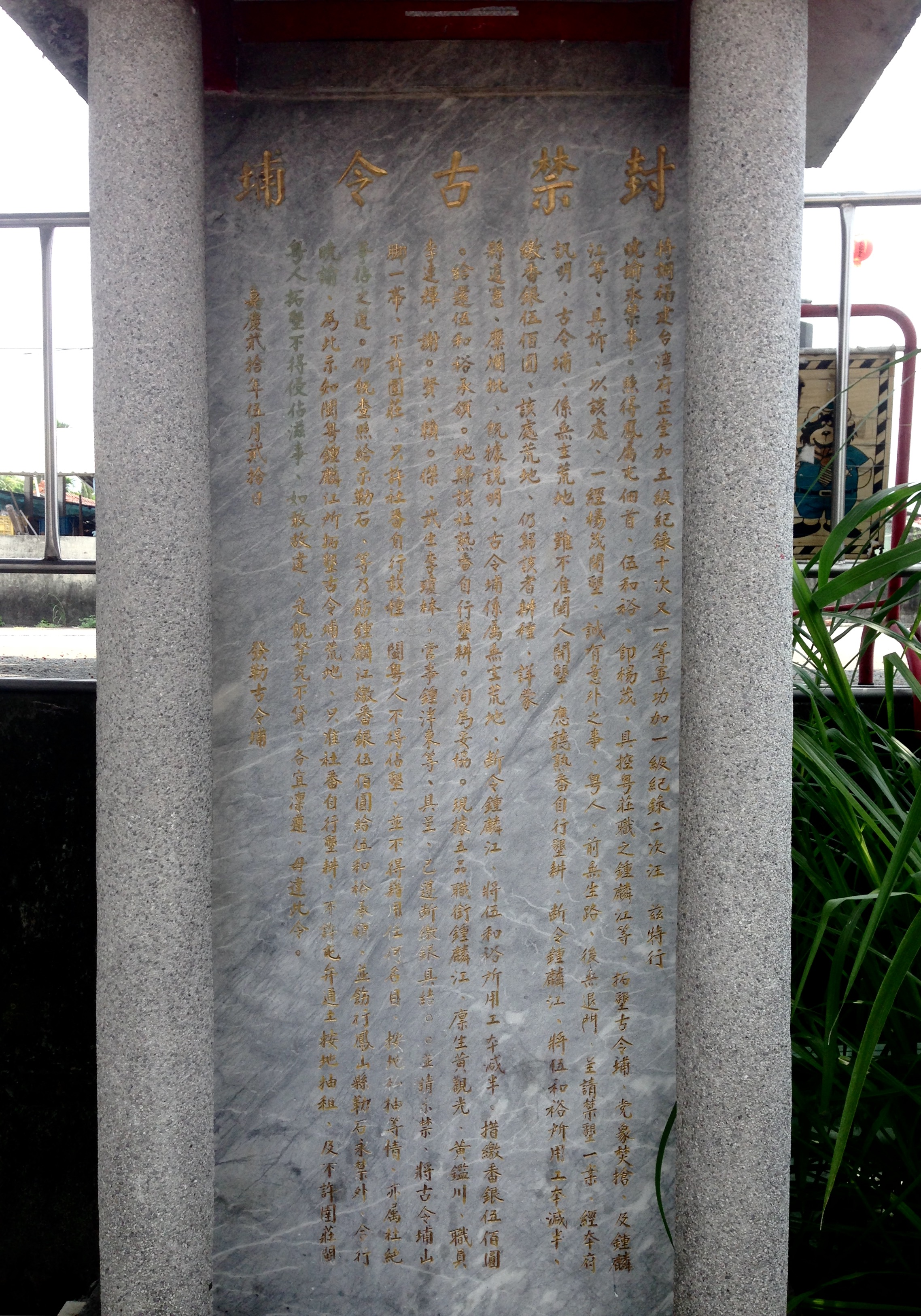 中文（台灣）: 老埤五穀廟的封禁古令埔碑